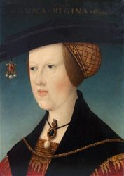 Schwester König Ludwigs II von Ungarn und Frau Ferdinands I. von Österreich